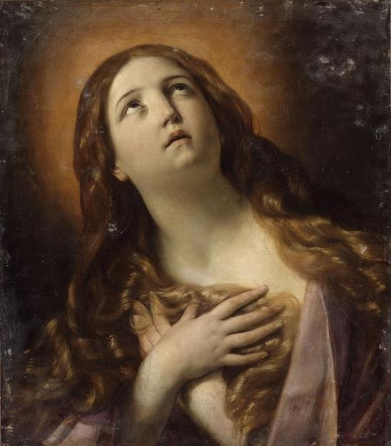 Marie-Madeleine en extase au pied de la croix